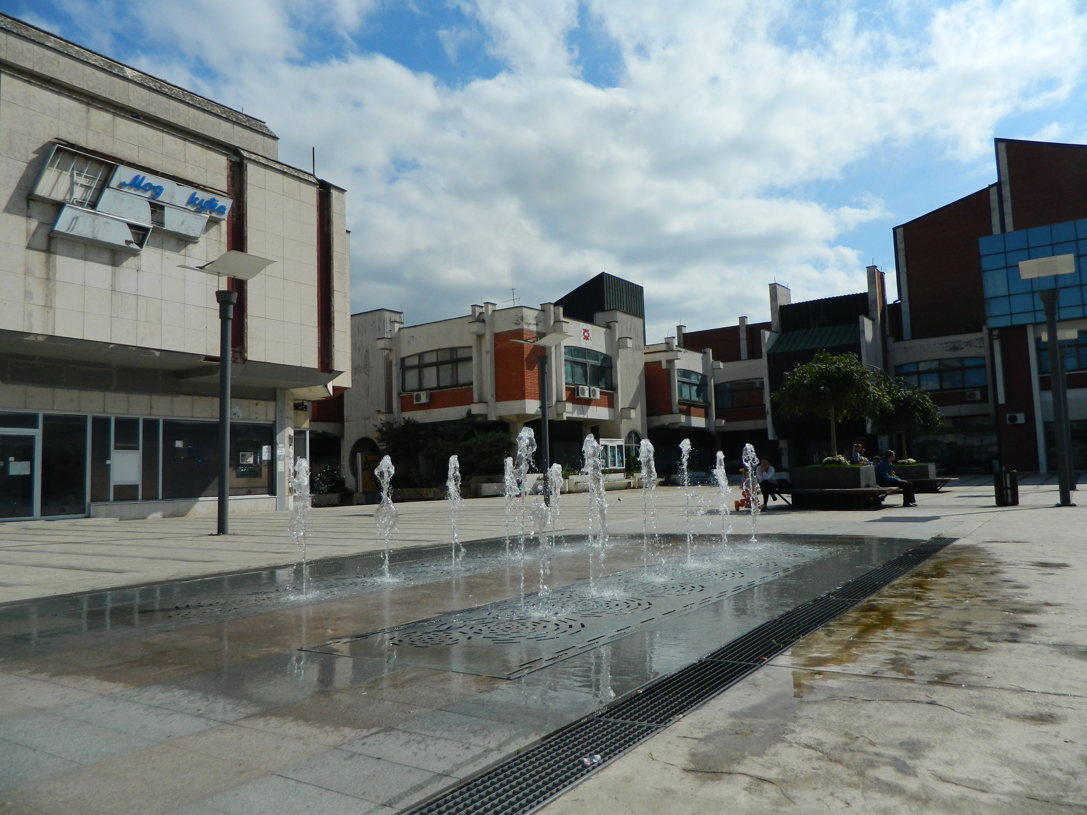 Centar grada Pirota